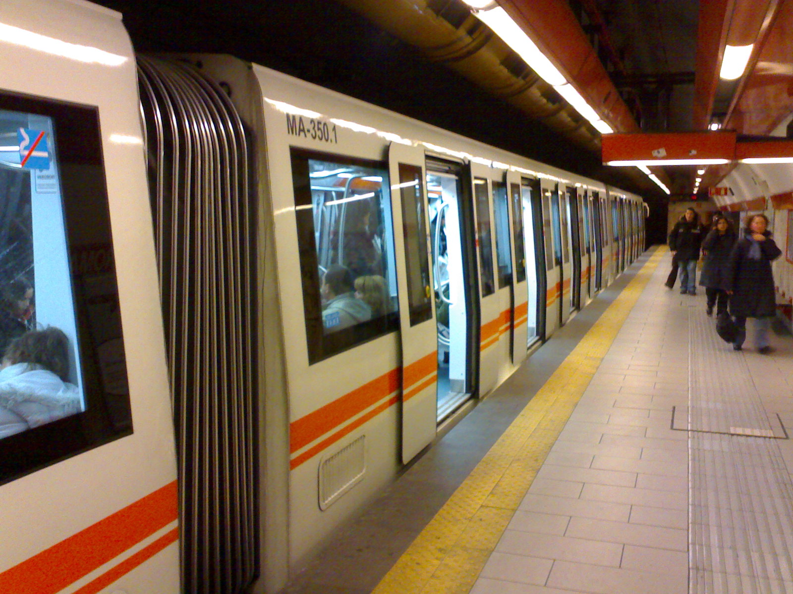 Vista laterale del treno S 300 della Metro A di Roma con le porte aperte